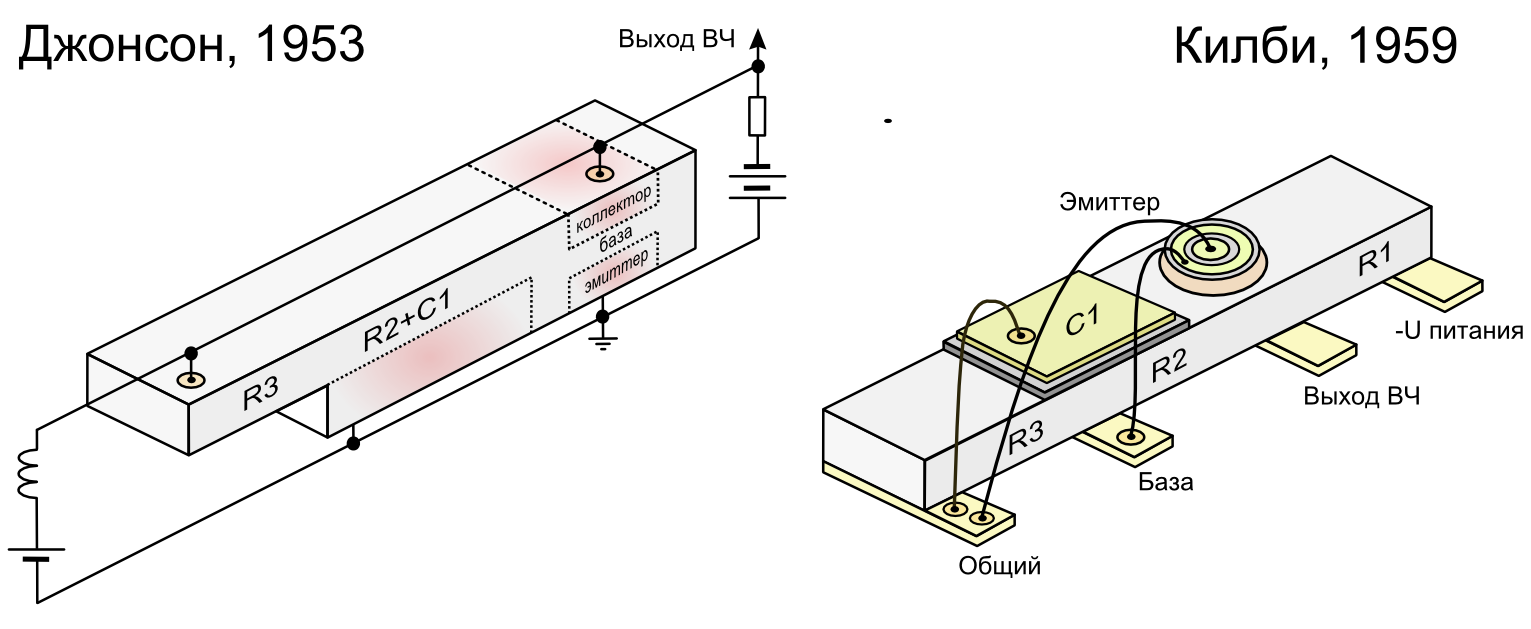 Сравнение схем генератора по патенту Джонсона 2816228 (заявка 21 мая 1953) и по патенту Килби 3138743 (заявка 6 февраля 1959)Comparison of oscillator ICs patented by Harwick Johnson (filed May 21, 1953) and Jack Kilby (filed Feb 6, 1959).